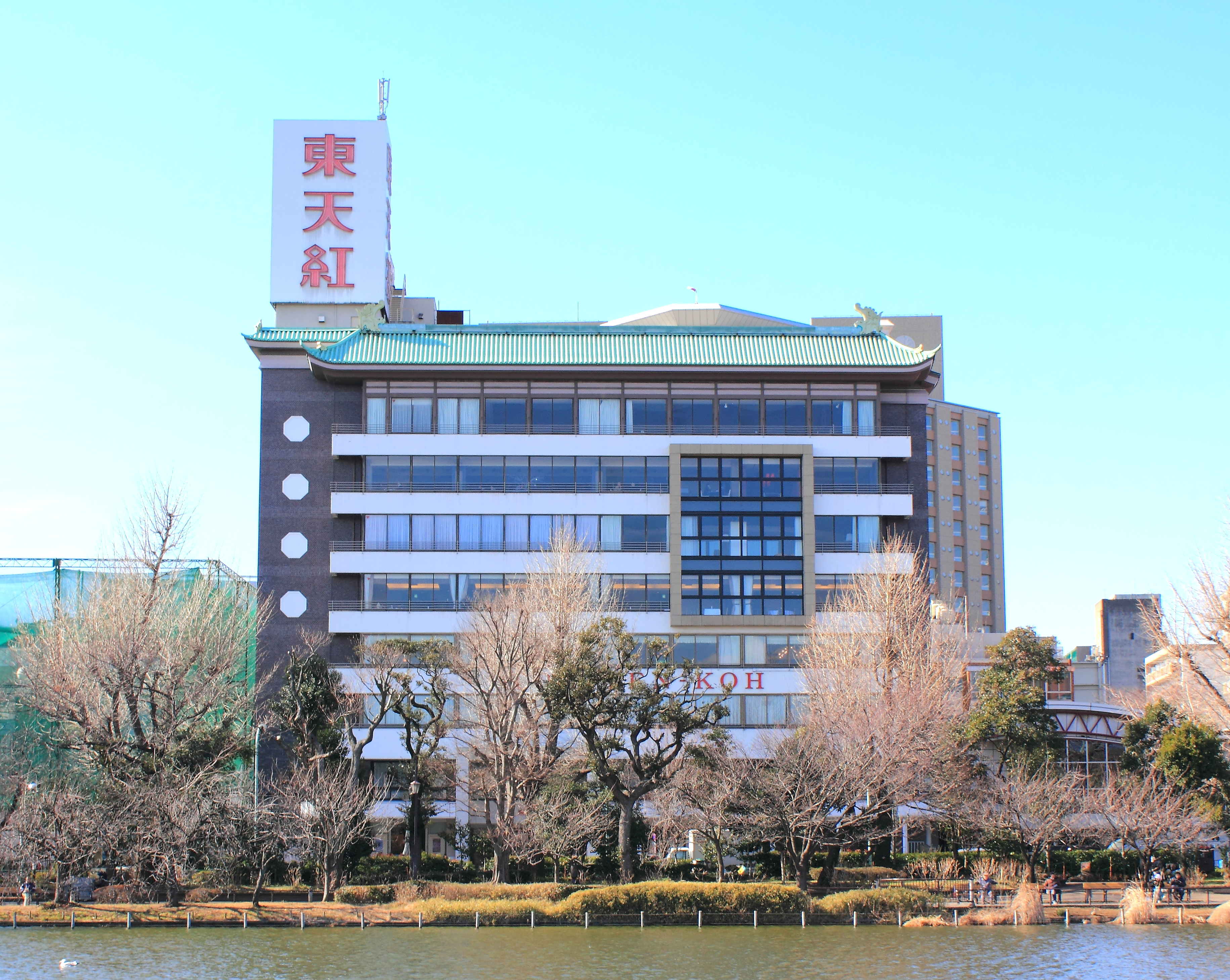 東天紅本社